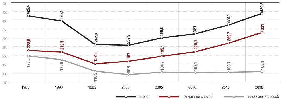 Добыча угля в Российской Федерации, млн тонн (по данным ЦДУ ТЭК - филиала ФГБУ "РЭА" Минэнерго России)